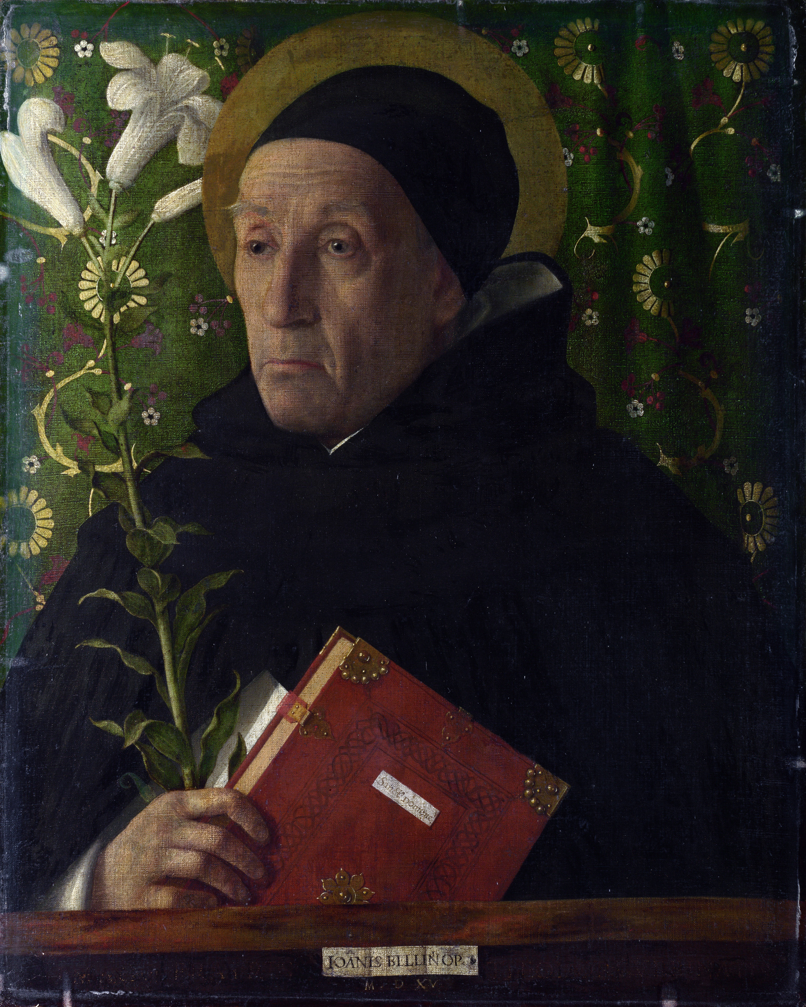 Portrait of Fra Theodoro da Urbino